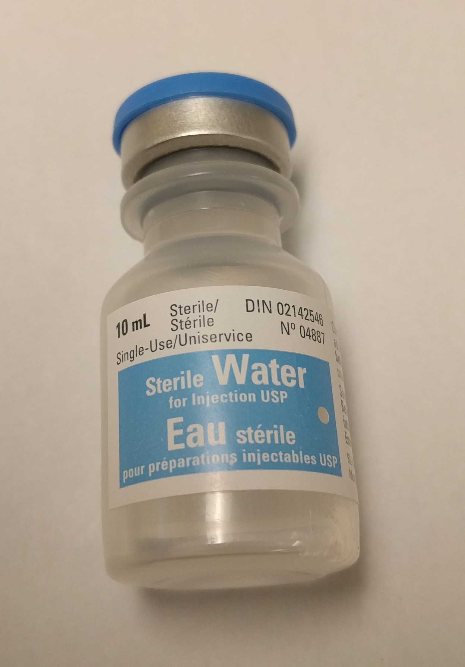 Sterile water